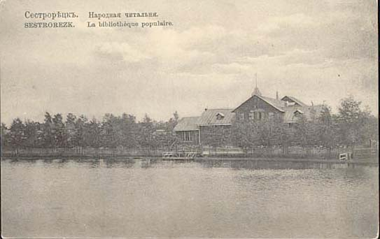 библиотеки Курортного района СПб